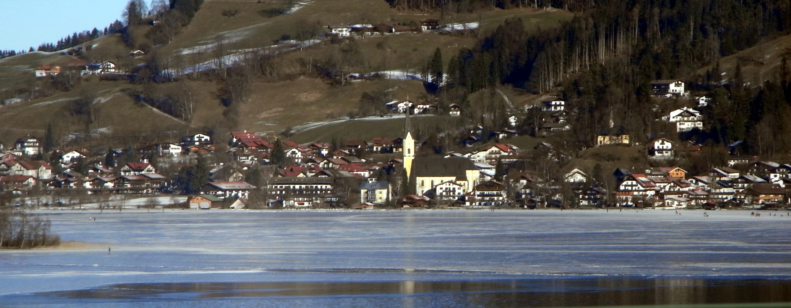 Lago Schliersee, parte glacikovrita, vido de la suda fino norden al komunumo Schliersee